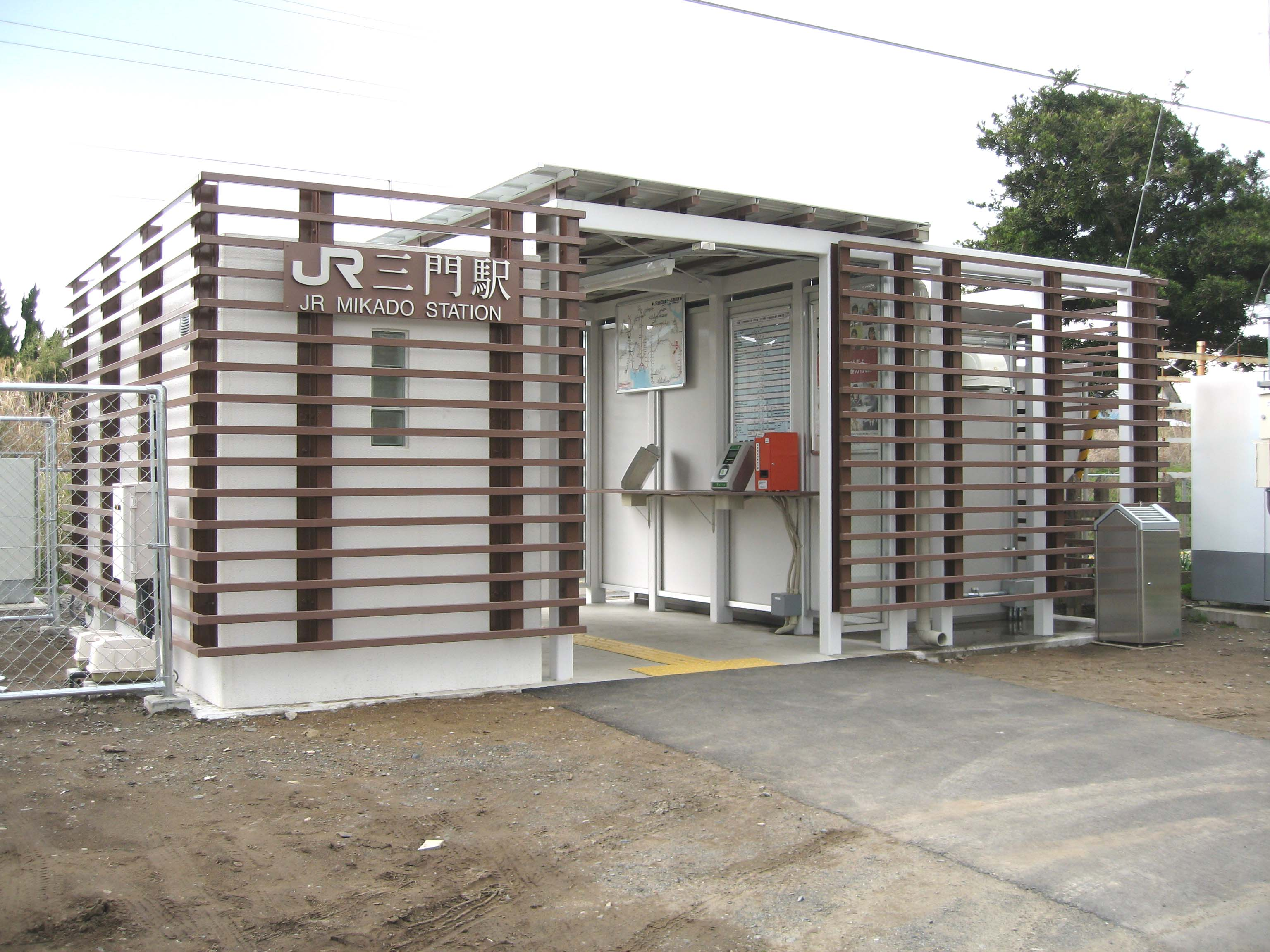 Mikado station, Sotobo Line, Chiba, Japan, 三門駅駅舎（2007年新築）